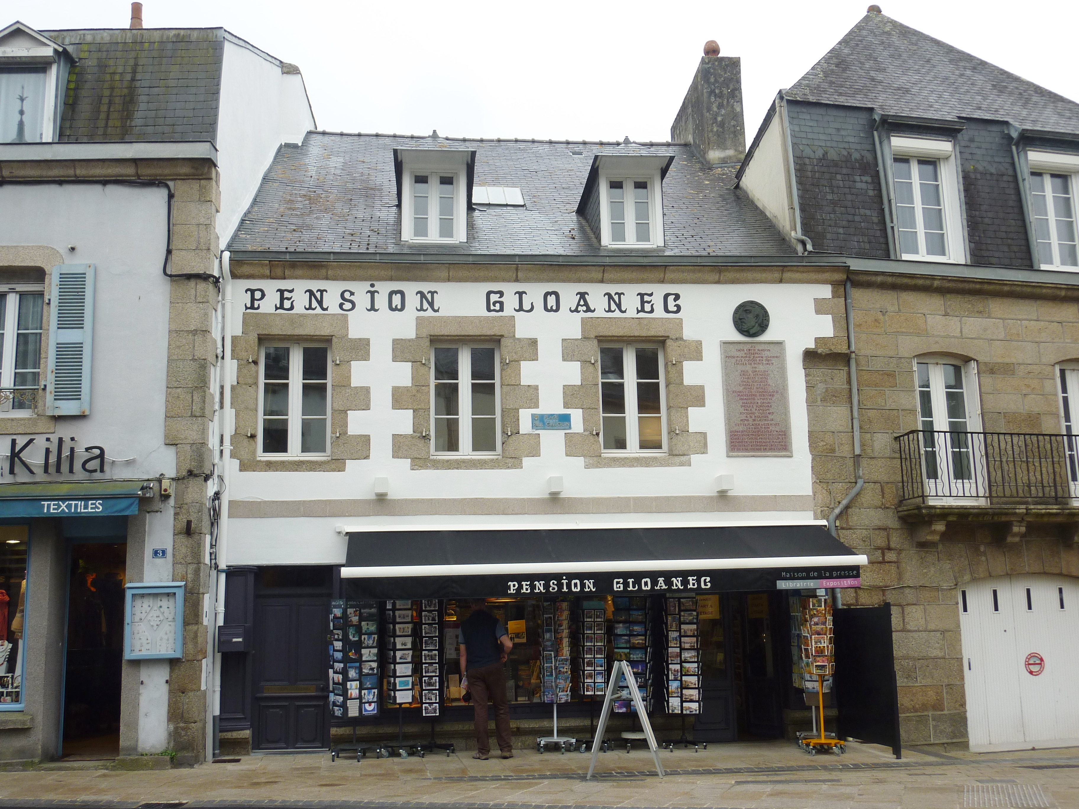 Pont-Aven : la pension Gloanec (en 2016)